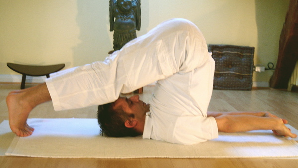 Yoga postures halasana